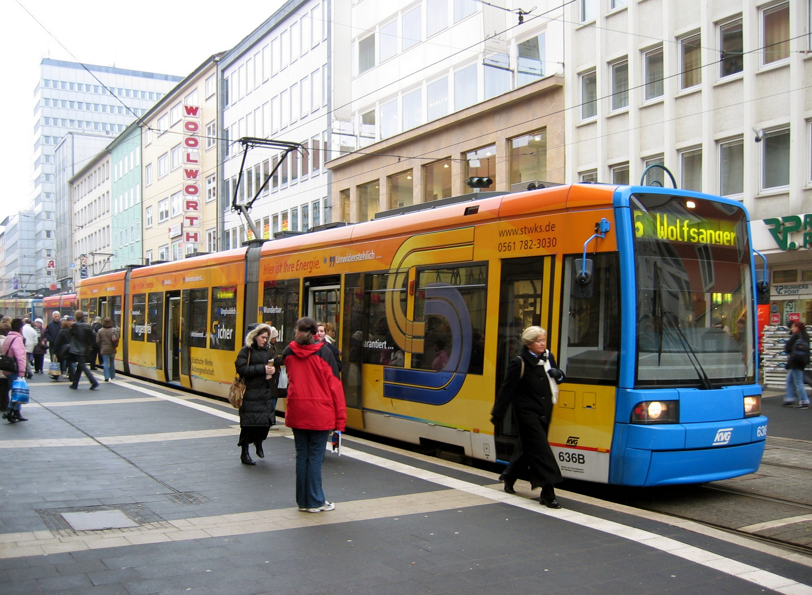 Kassel, Straßenbahn Flexity Classic an der Haltestelle Rathaus.